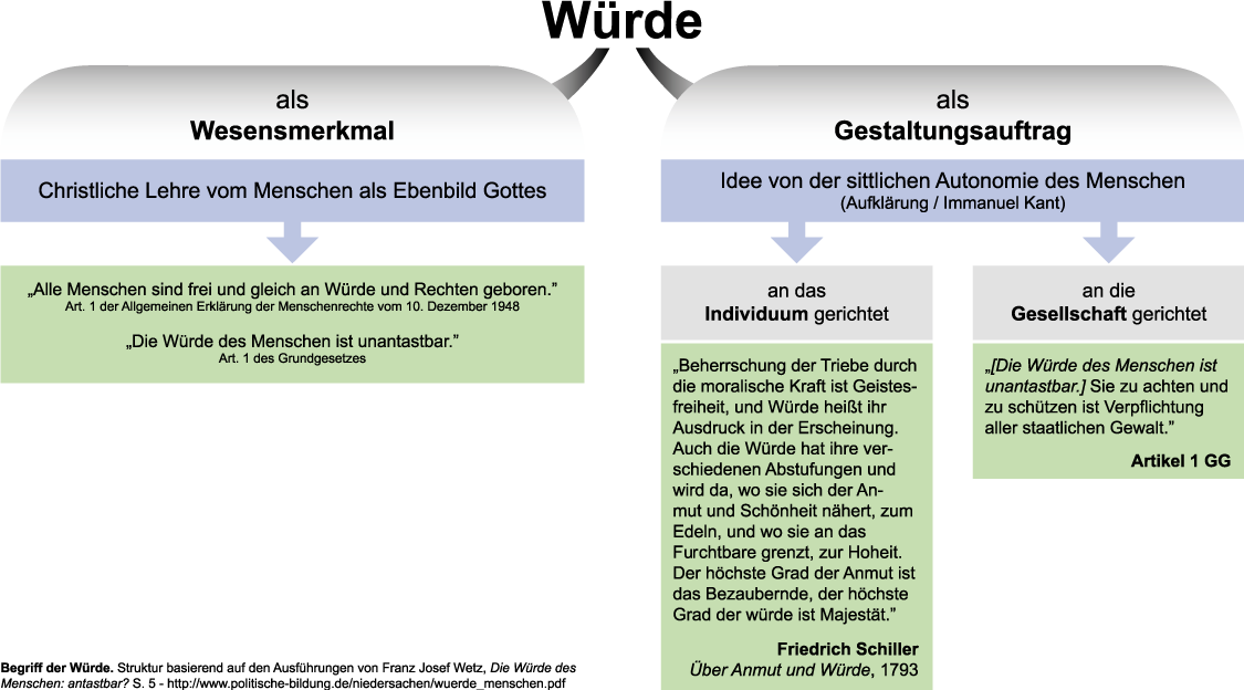 "Schönere" Version von Bild:Wuerde.jpg by Benutzer:Queryzo/Unterschrift2 Queryzo 11:36, 20. Nov. 2006 (CET) Original-Beschreibung: (Original text: Würde als (natürliches) Wesensmerkmal und (kultureller) Gestaltungsauftrag) andere Versionen: ?